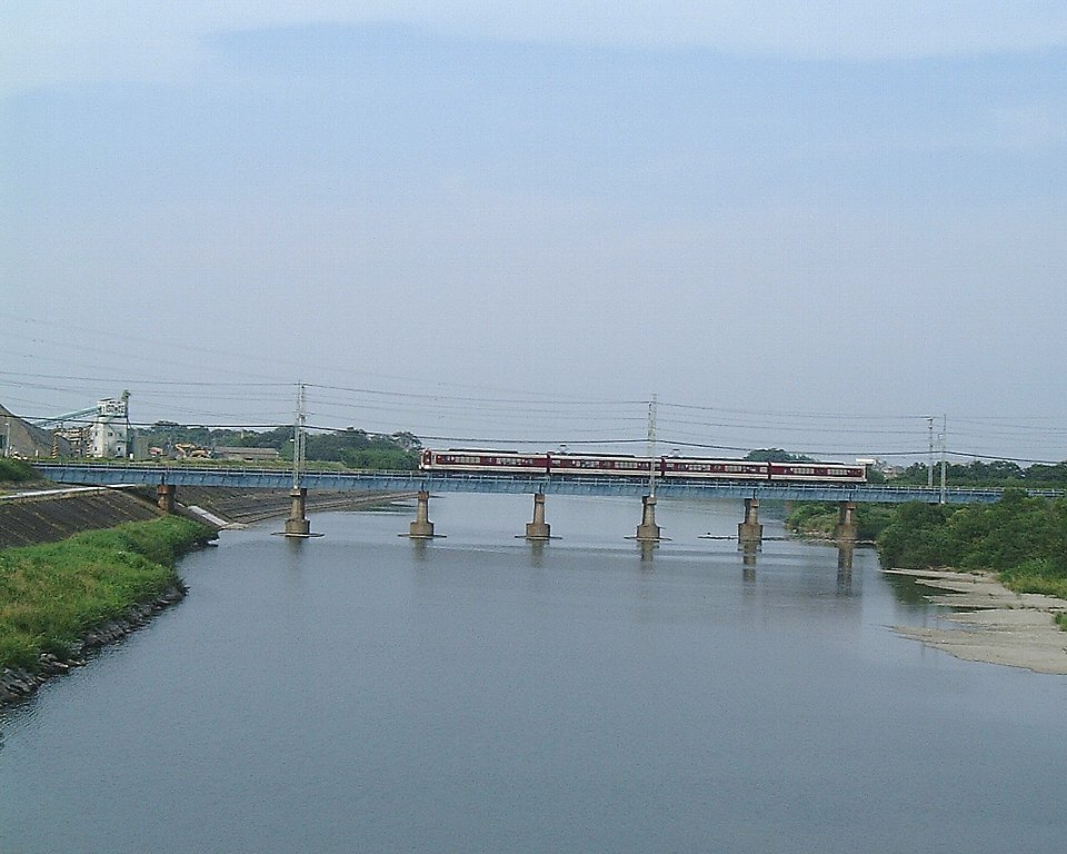 櫛田川を渡る近鉄山田線（櫛田～漕代間） 櫛田橋から撮影 2002年6月10日 Bakkai撮影